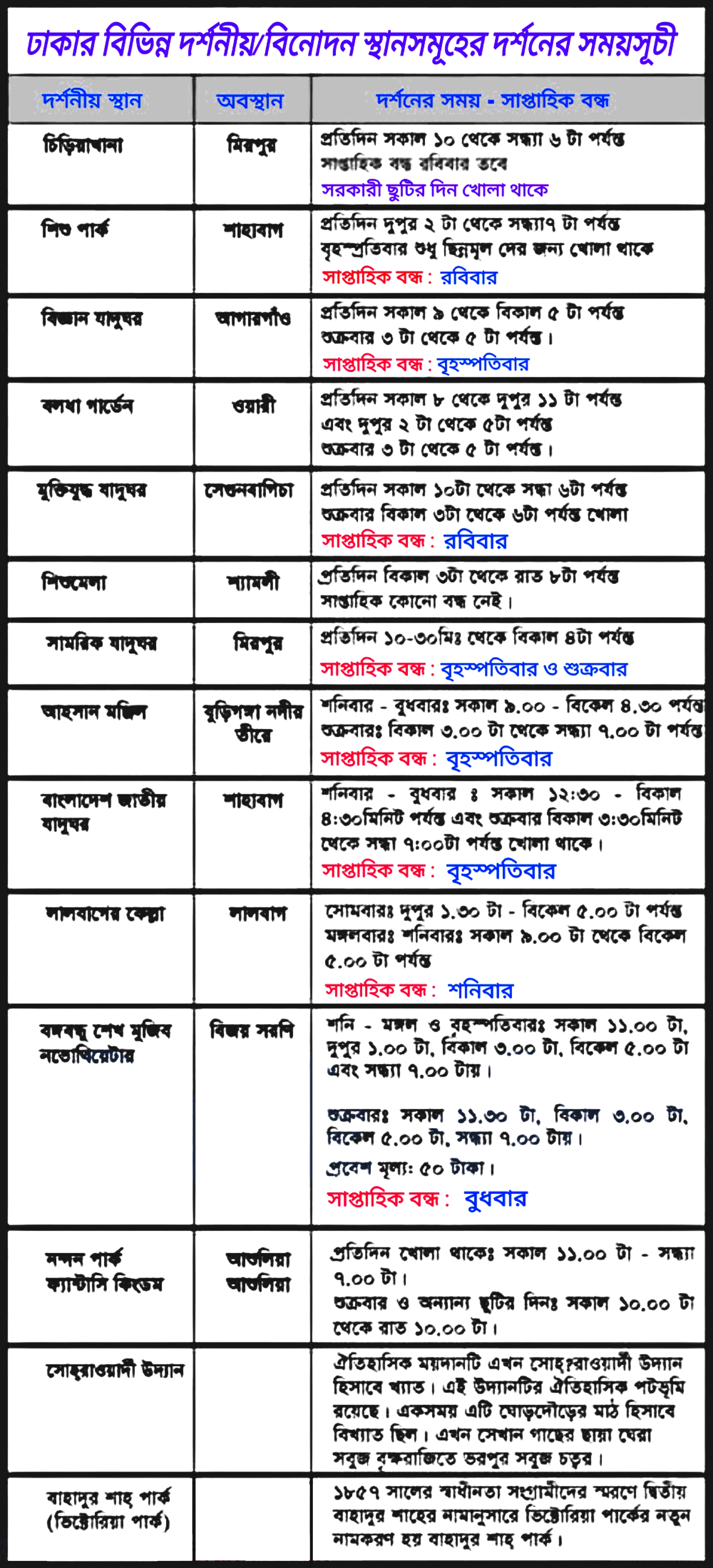 ঢাকার দর্শনীয় স্থানসমূহের অবস্থান ও সময়সূচী